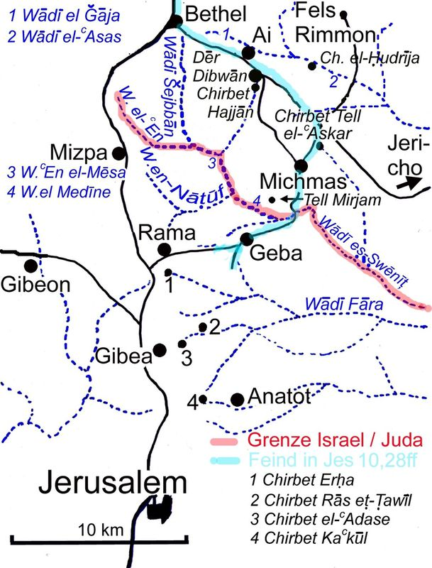 Die Straßen nördlich von Jerusalem mit der Anmarschroute der Feinde nach Jes 10,28-32.